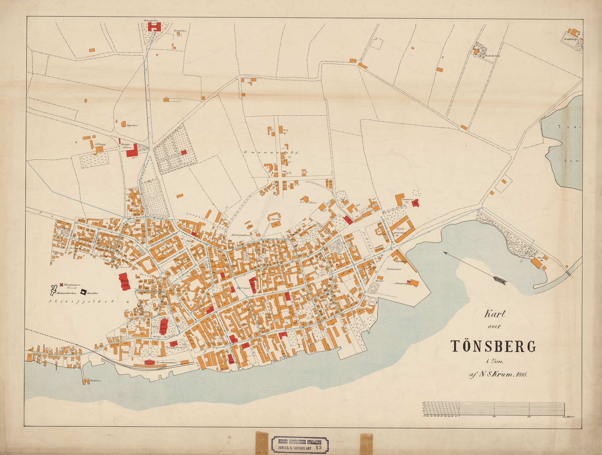 Kart over Tønsberg 1895. Målestokk: 1:2500